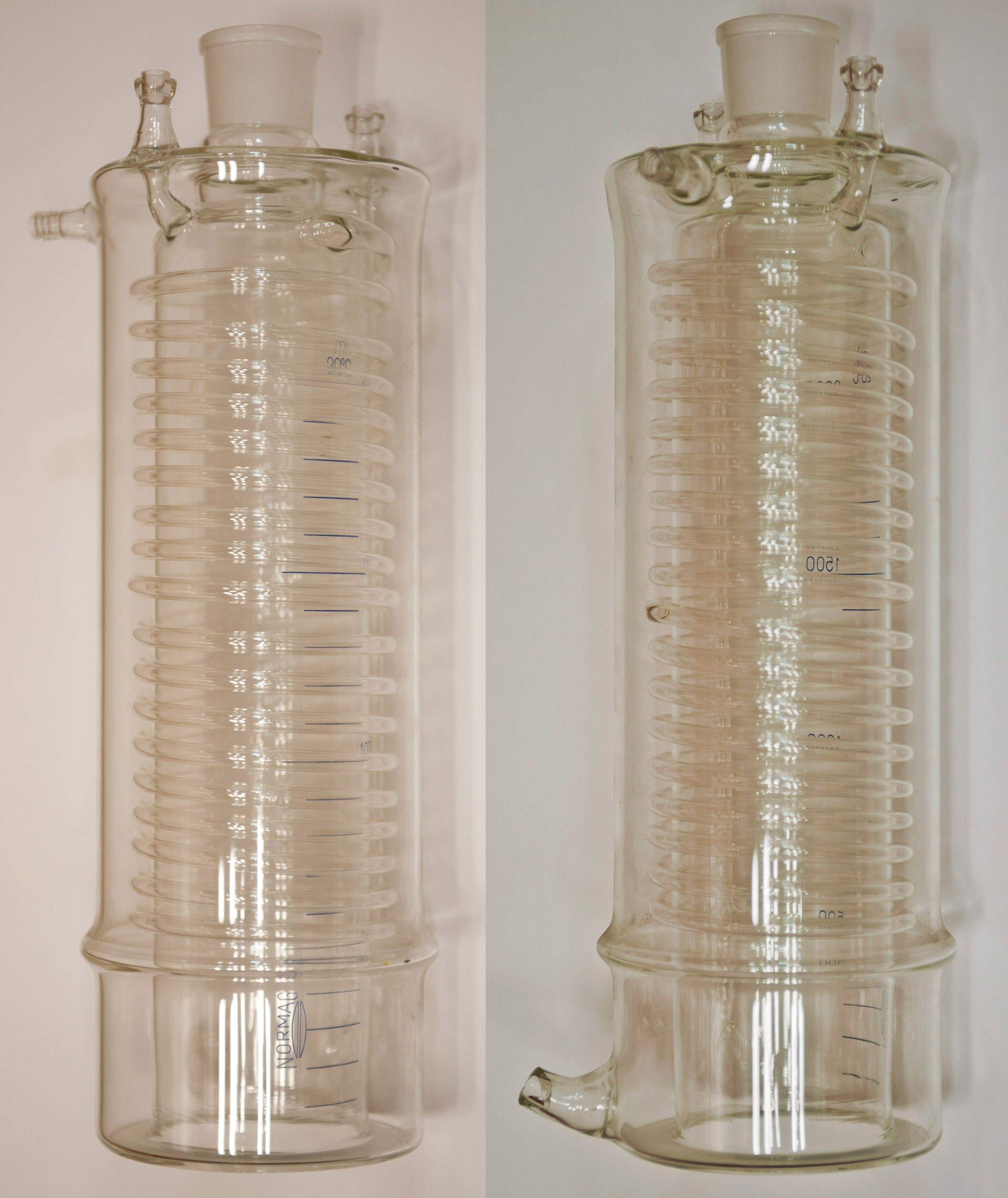 Distiller